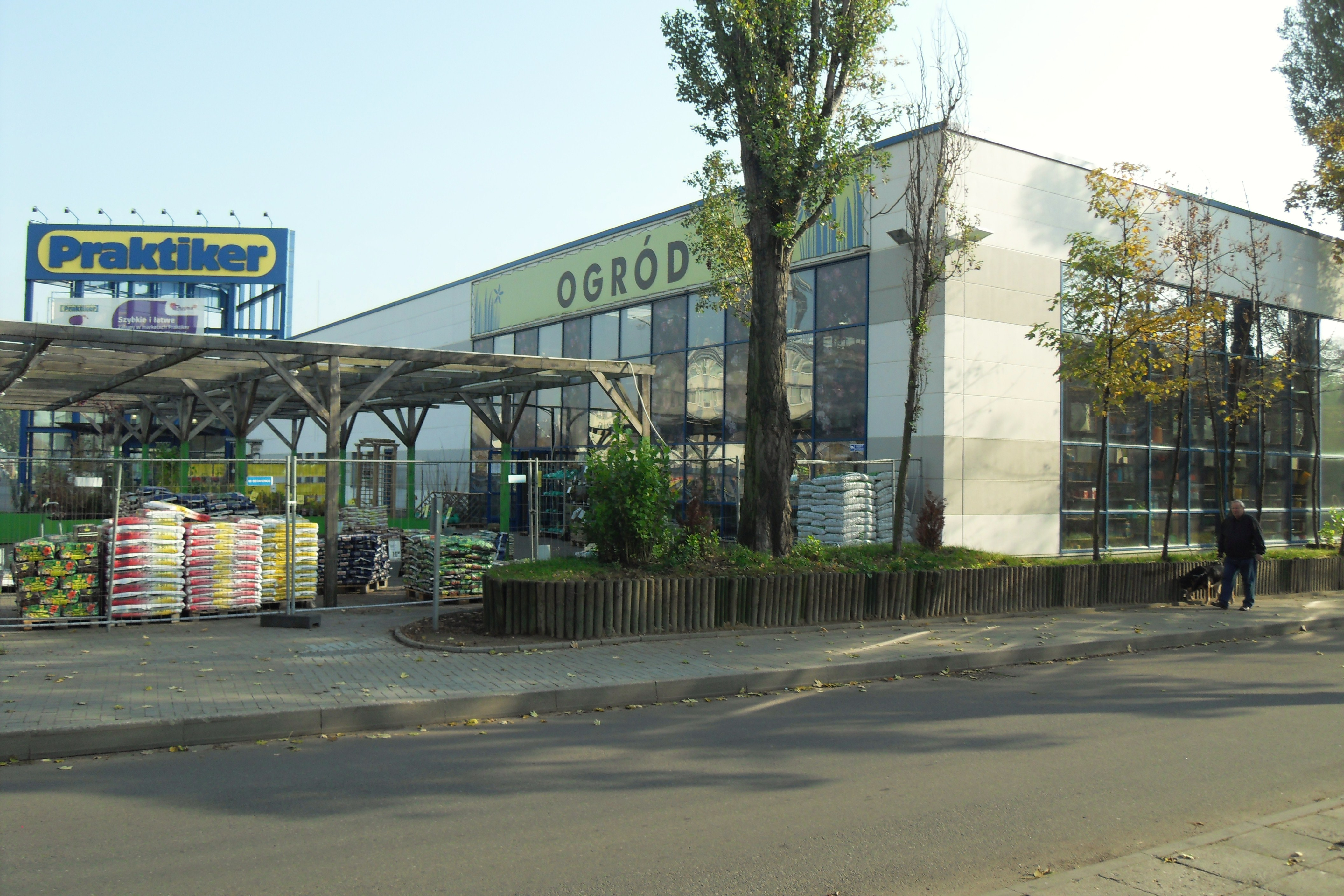 Gdańsk Przymorze. "Praktiker", ul. Kołobrzeska 26.